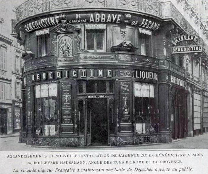 La Bénédictine (décembre 1905).